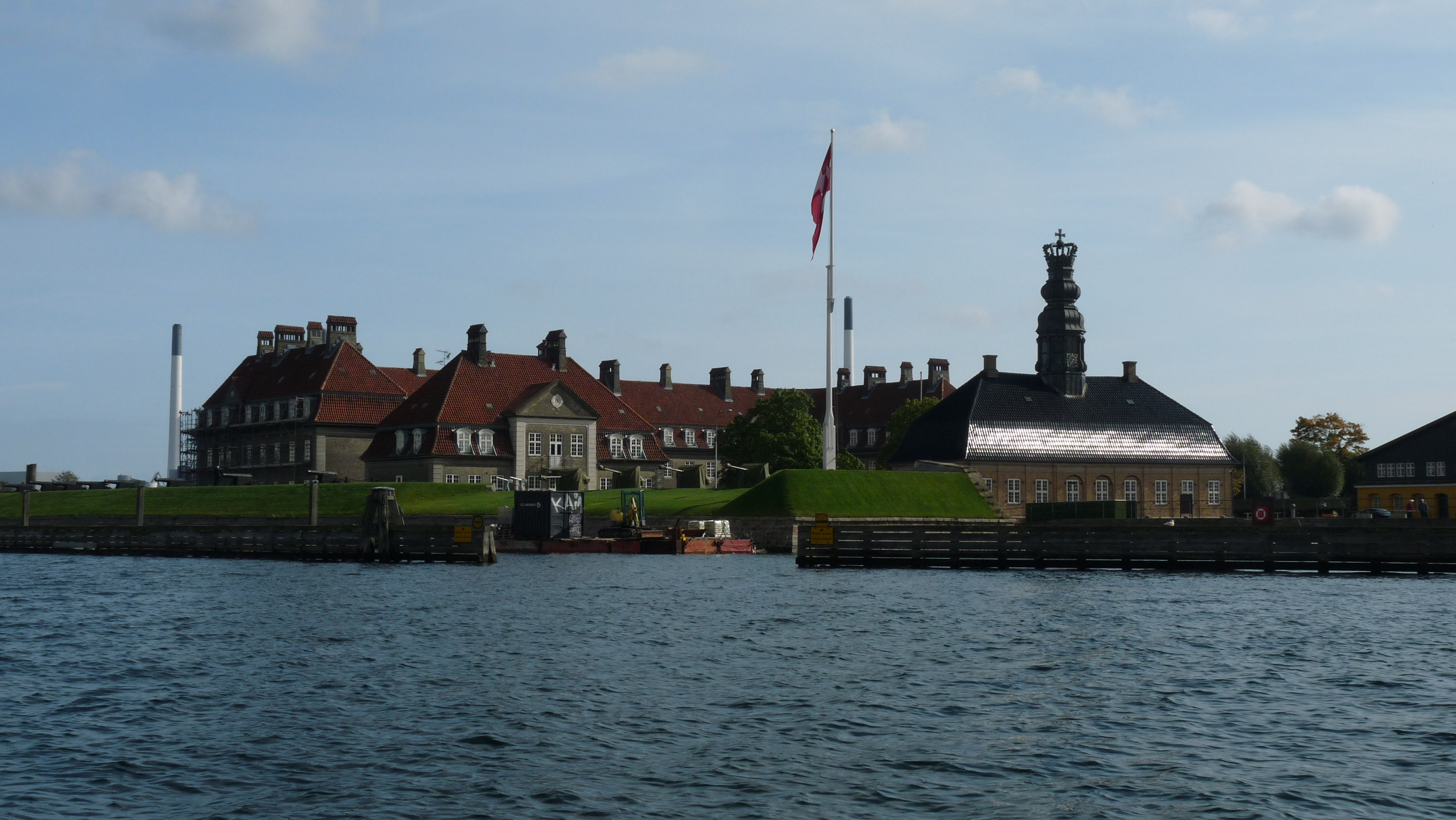 Nyholm in Copenhagen, Denmark